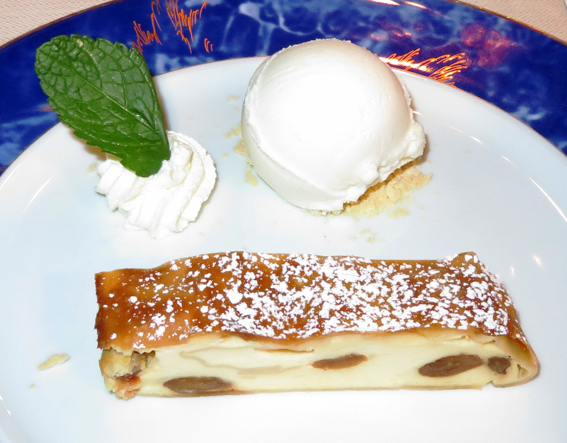 Millirahmstrudel mit Sahne und Eis